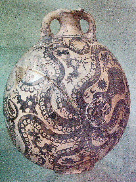 Argonaut oder Oktopus auf einem Gefäß im Meeresstil. Archäologisches Museum, Iraklio, Kreta. Aufnahmedatum: August 2004.